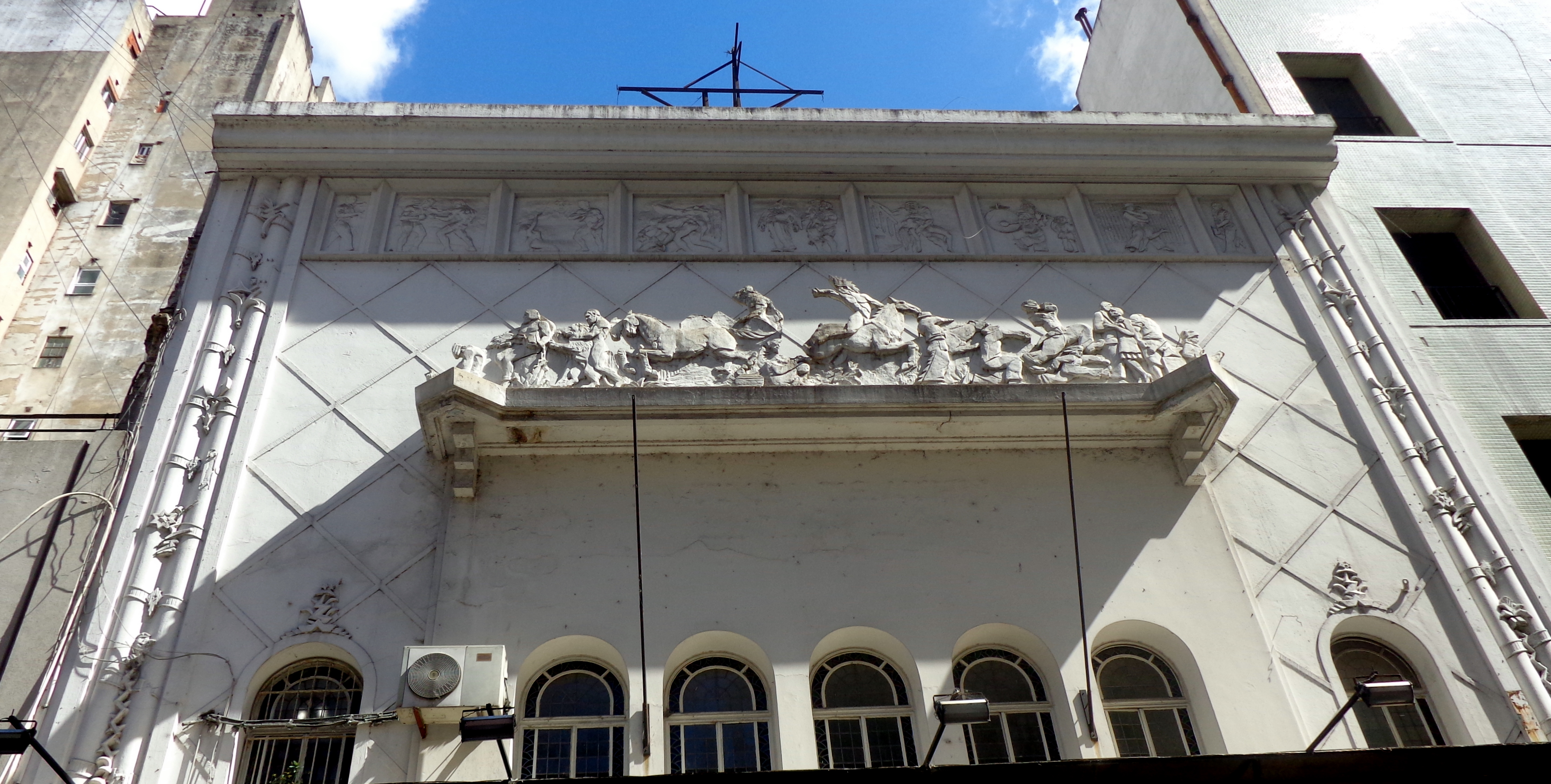 Detalle de la fachada del Complejo Tita Merello, ex Cine Suipacha. Suipacha 442. Buenos Aires, Argentina.